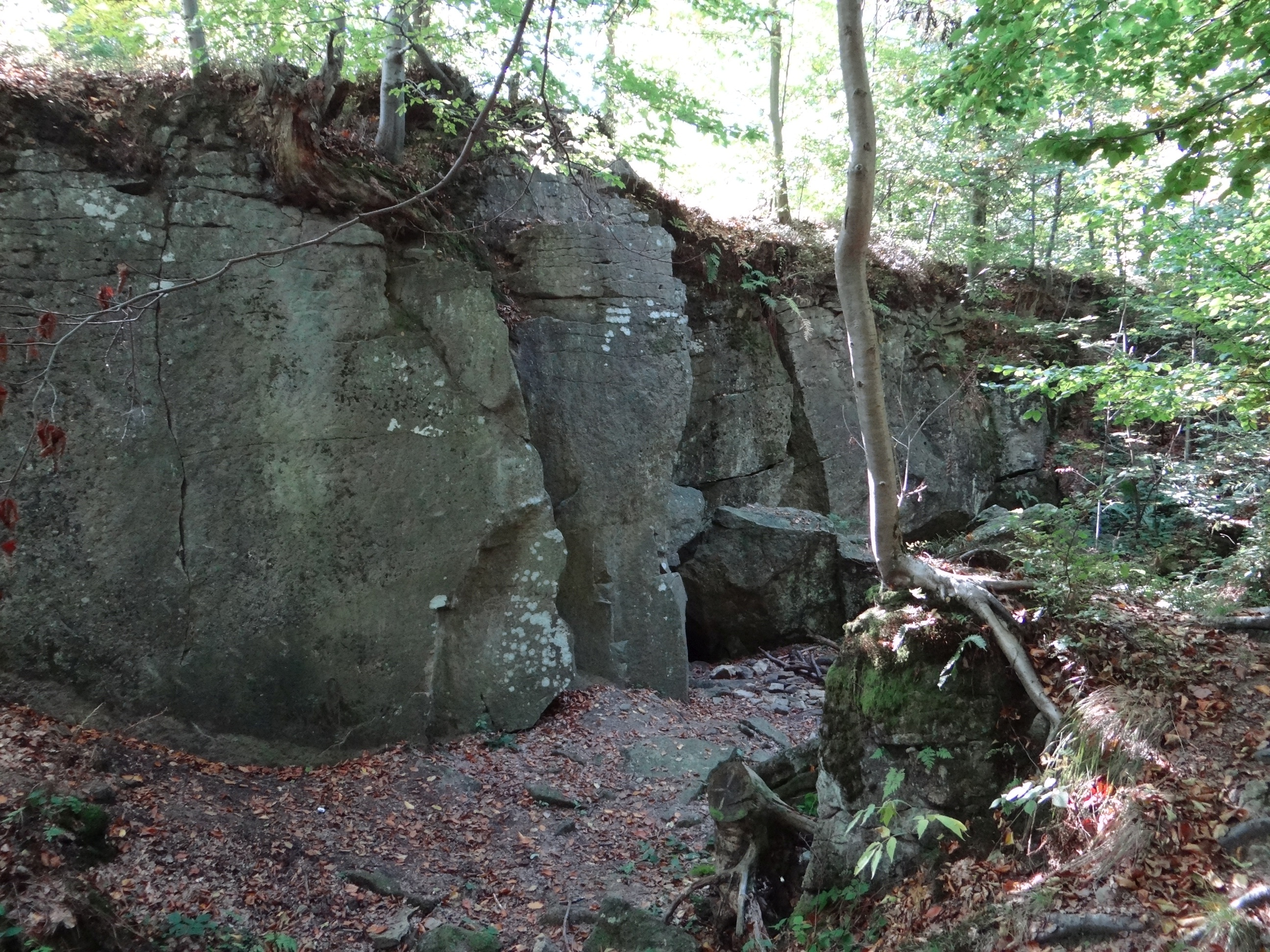 Zamczysko na Ścieszków Groniu